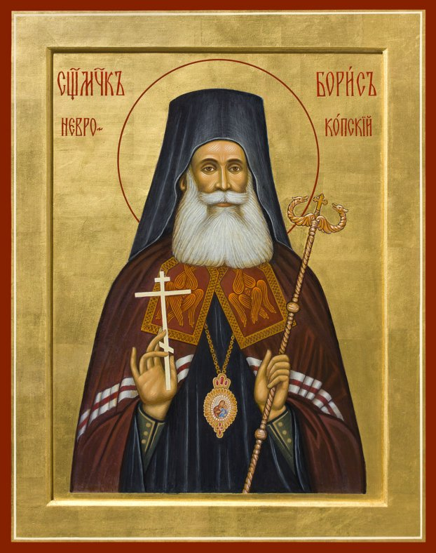 Икона на свещеномъченик Борис Неврокопски